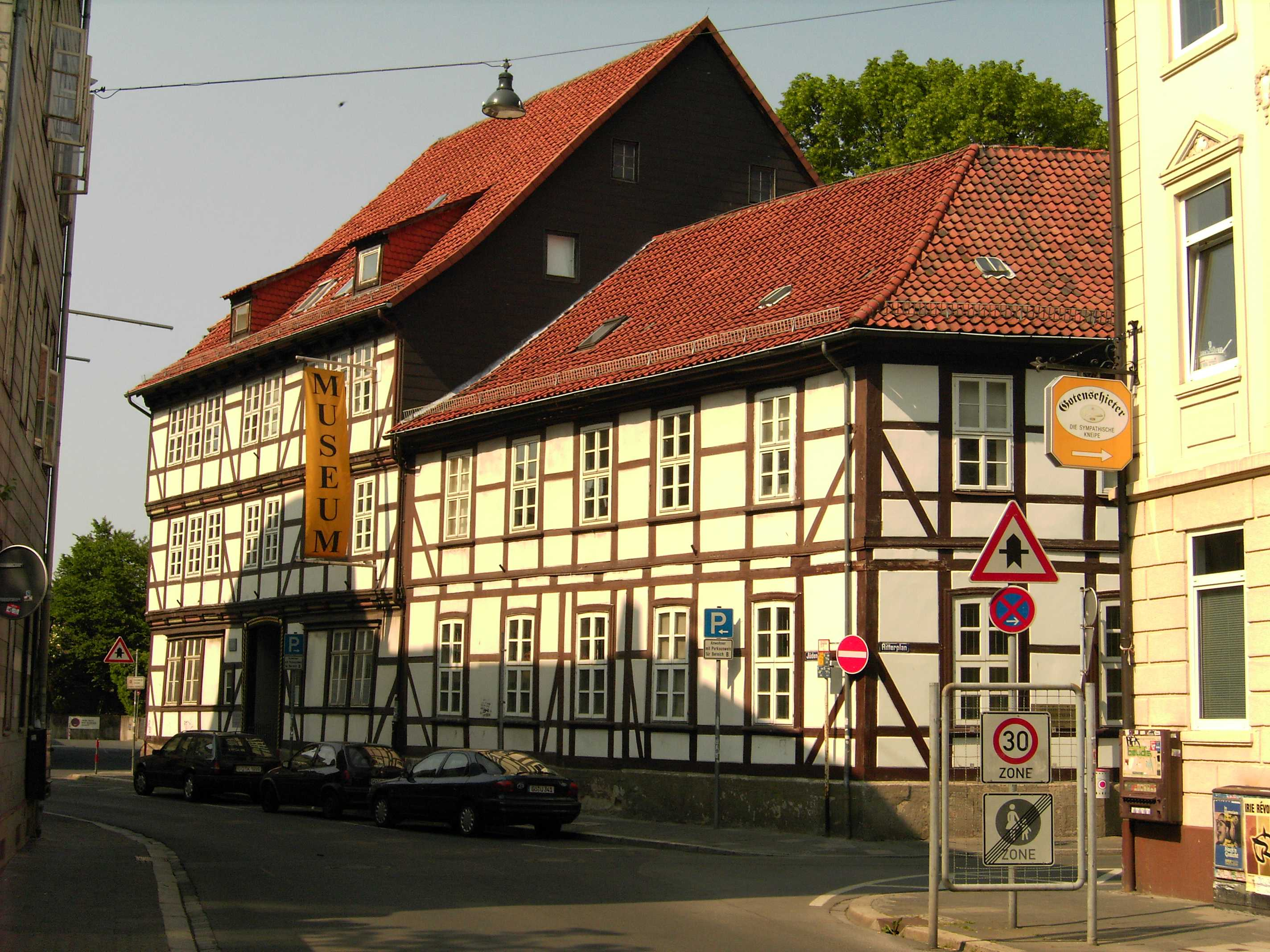 Göttingen, City Museum, Corner Jüdenstr / Ritterplan, view Jüdenstr.